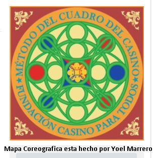 Карта перемещений в Касино